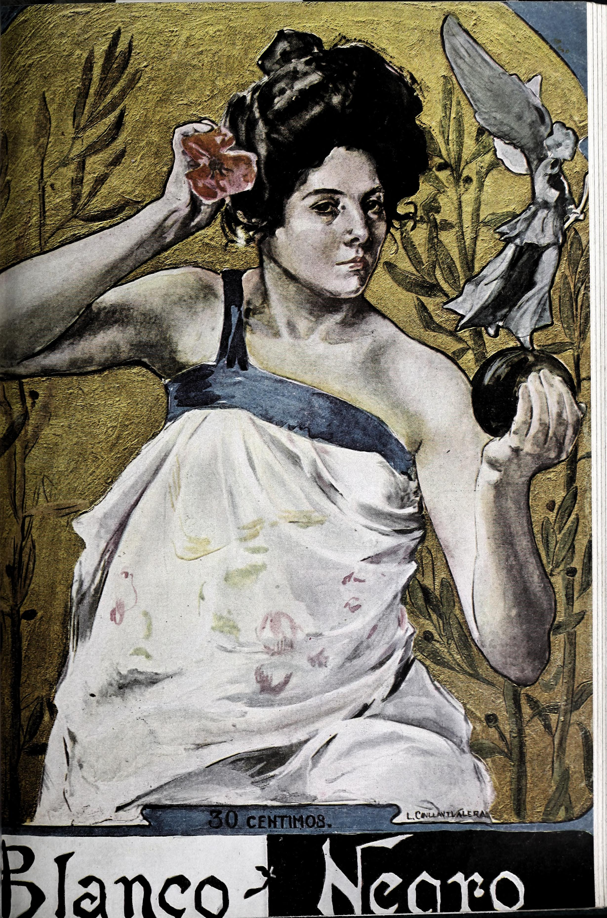 Portada de Lorenzo Coullaut Valera.